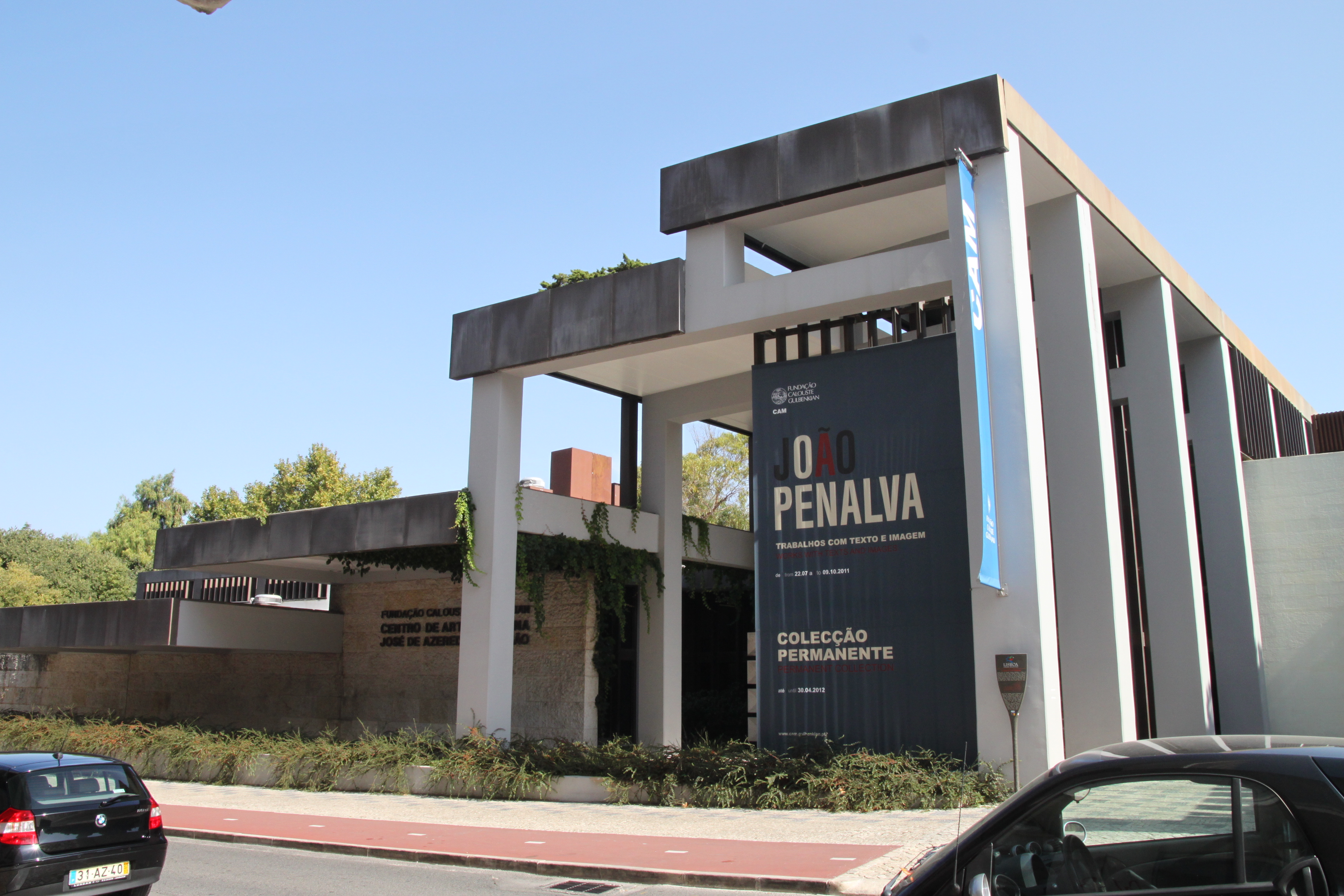 Fundação Calouste Gulbenkian, incluindo o parque, a sede, o museu, o CAM e os jardins This file was uploaded for Wiki Loves Monuments in Portugal with the unique identifier 330483.